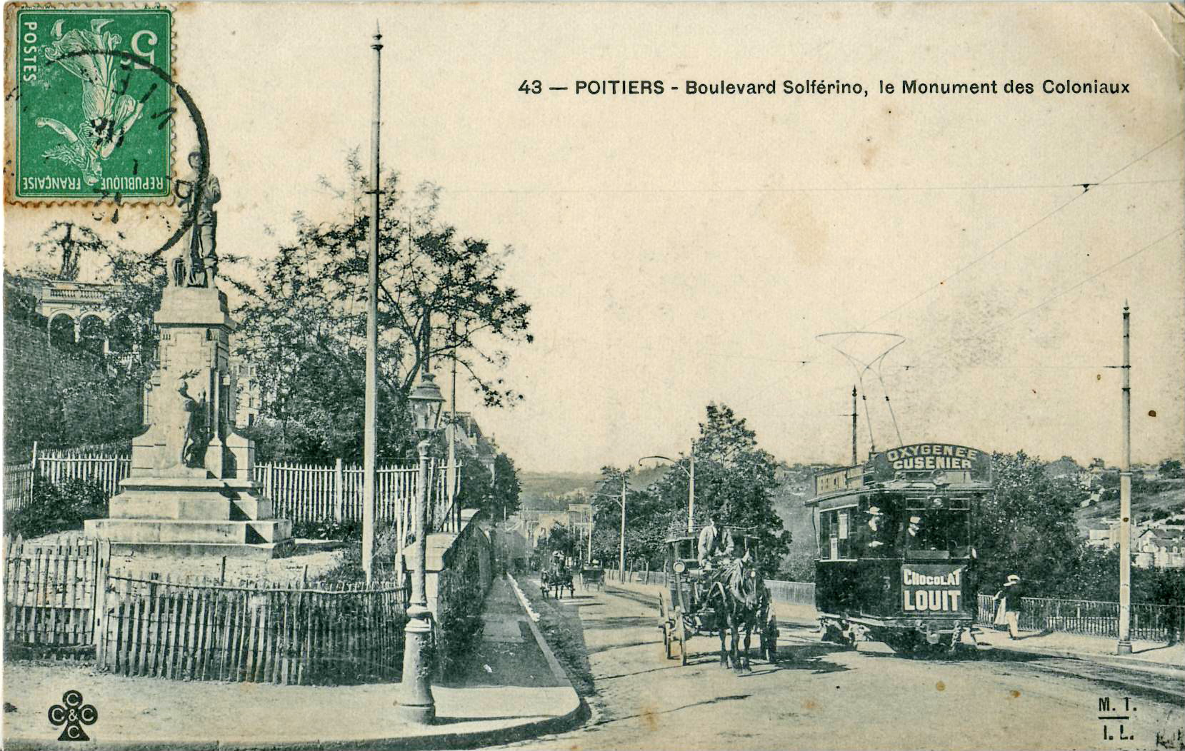 Carte postale ancienne éditée par CCCC MTIL n°43 : POITIERS - Boulevard Solférino - Le Monument des Coloniaux